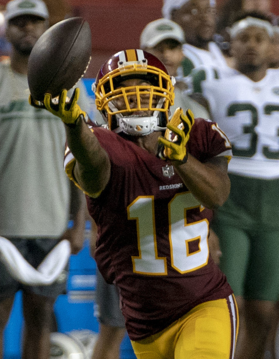 Jets at Redskins 8/16/18